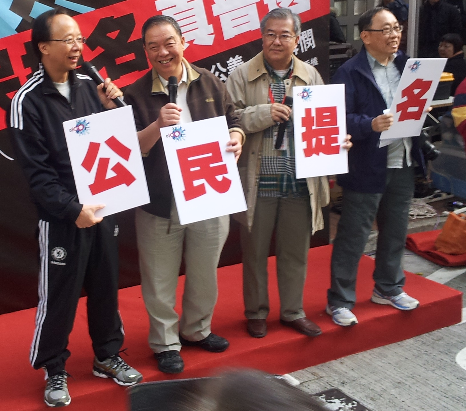 中文（香港）: D100節目主持，由左至右，李錦洪、吳明林、林旭華、吳志森